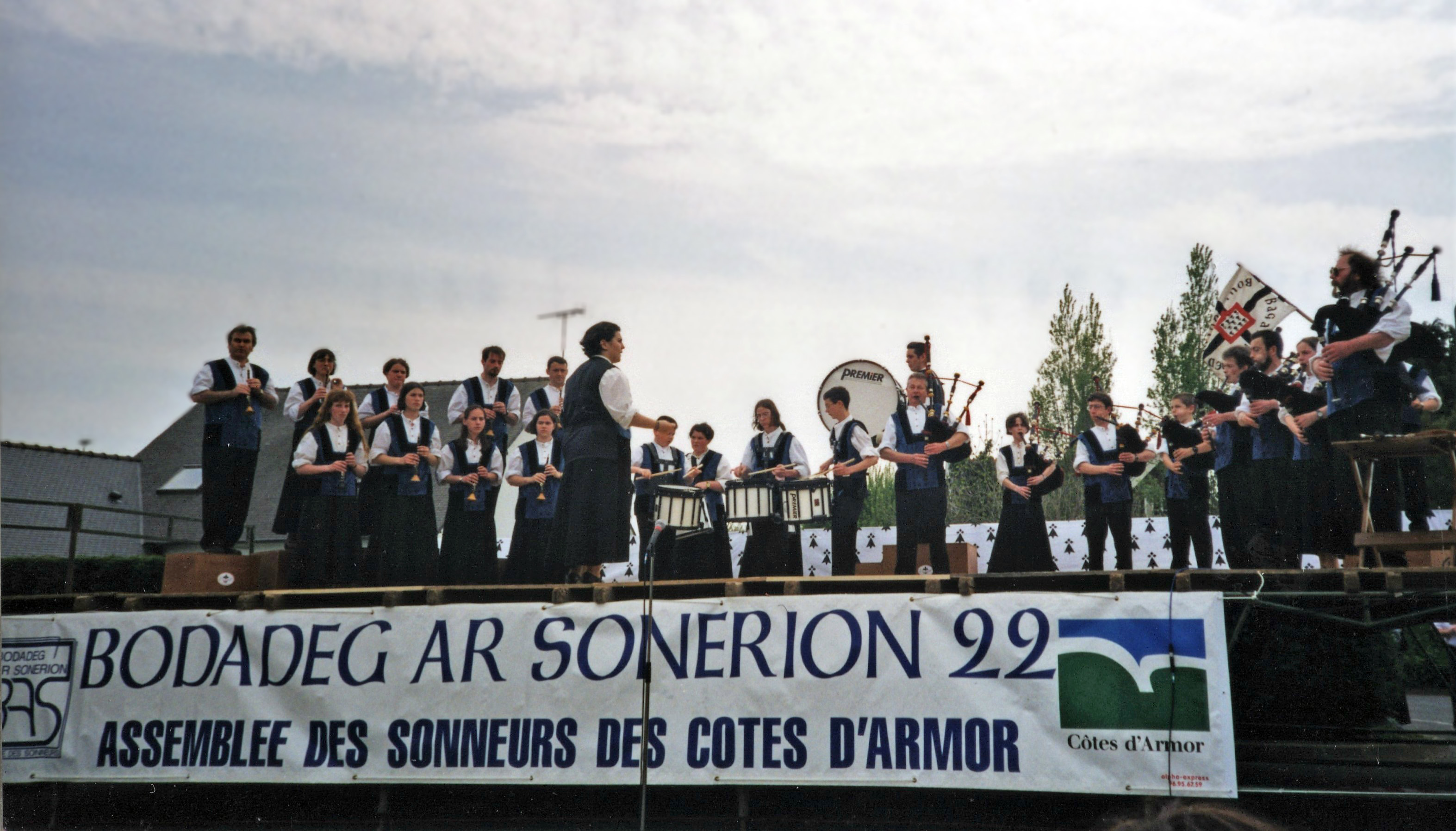 Le Bagad Boulvriag au concours départemental de Bodadeg ar Sonerion 22 le 8 mai 1998 à Plouha.